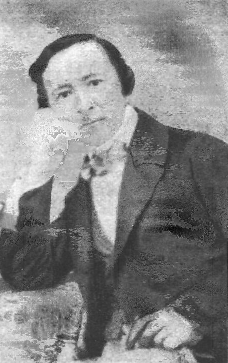 Fotografi av Zacharias Topelius 1856.